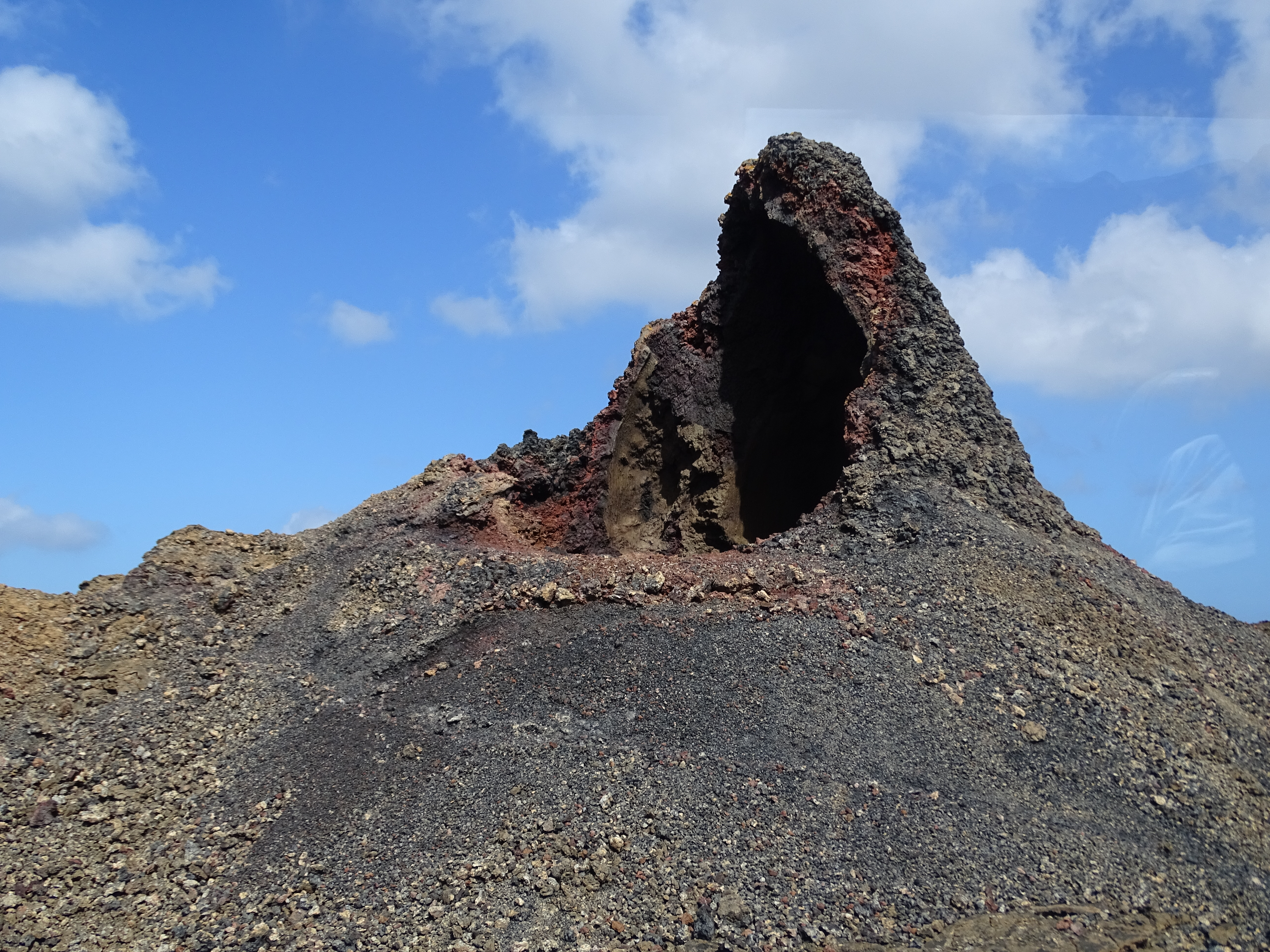 Manto de la Virgen (Umhang der Jungfrau), ein Vulkanschlund ("hornito") im Timanfaya-Nationalpark (Montaña de Fuego, Parque Nacional de Timanfaya), Lanzarote, Islas Canarias